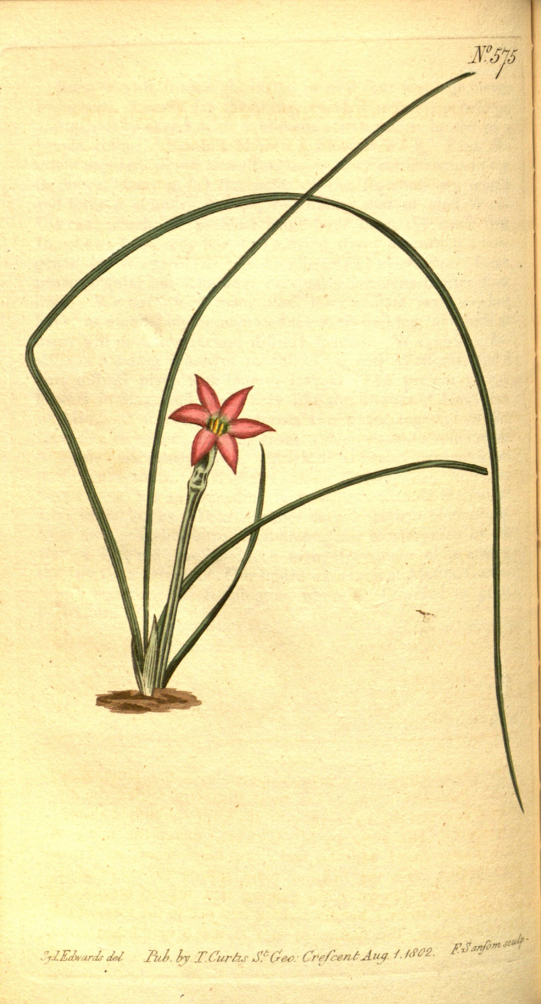 'E&ardtdd Tzd. by T.Curlu SfGee: frefcetUAty *• ***' a /. M02. ■